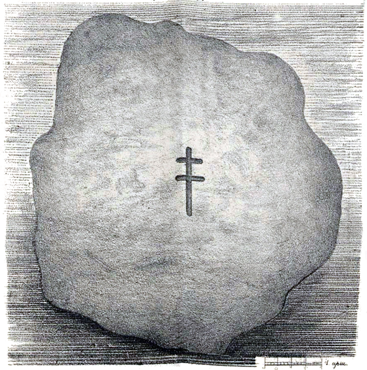 Двинской, или Борисов камень 5-й.